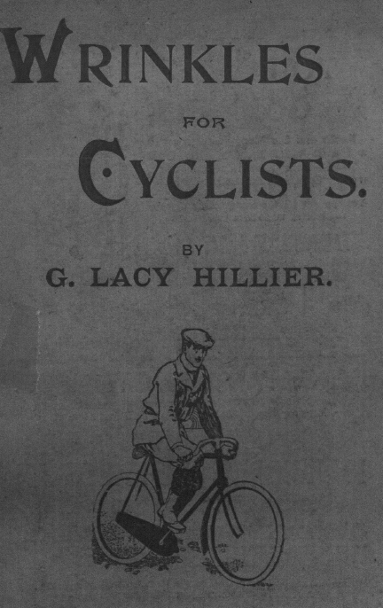 Deckblatt des Buches Wrinkles for Cyclists, London 1898, von George Lacy Hillier